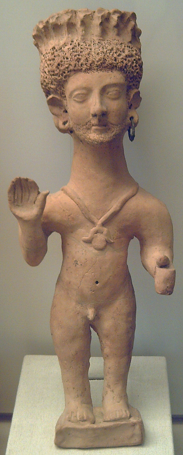 Praying statuette.